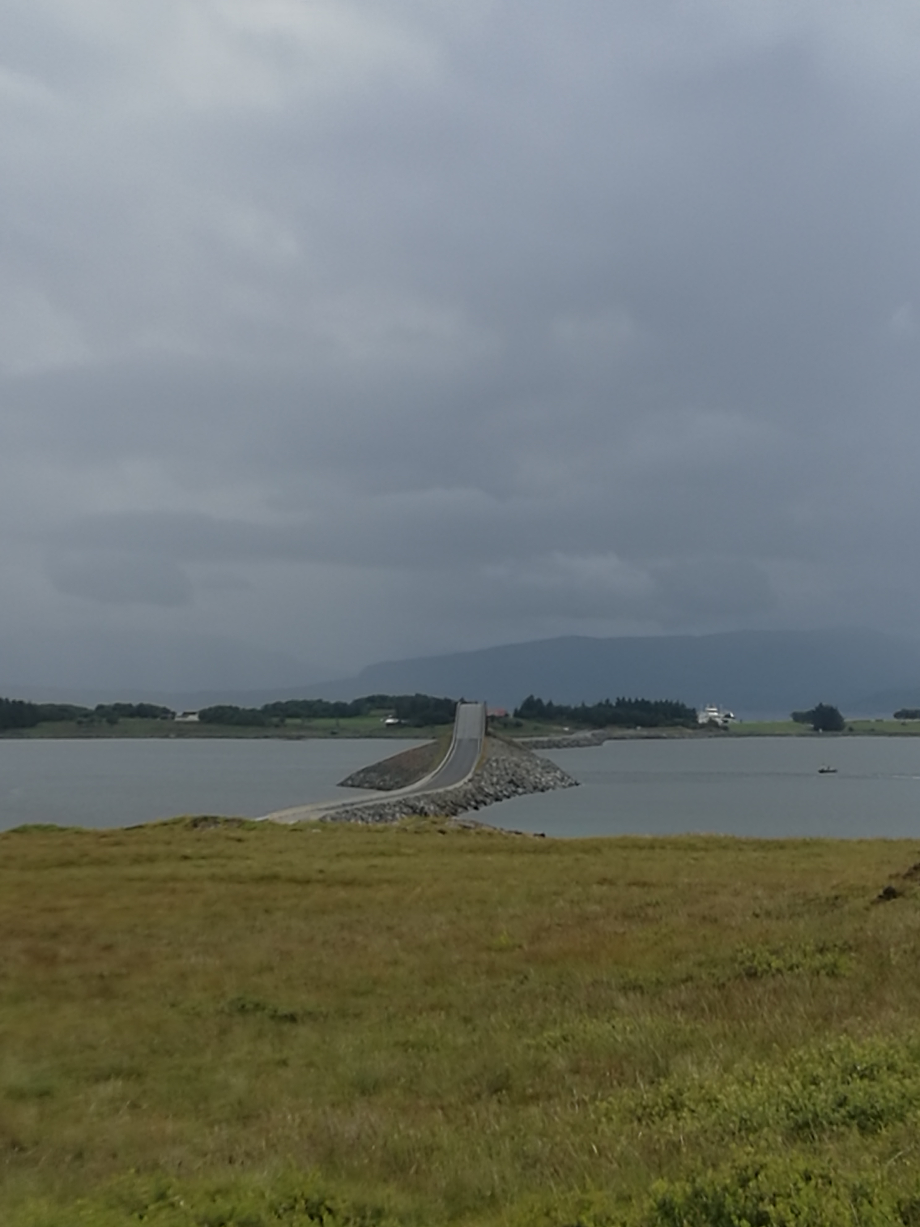 Kulisvabrua 232 meter på Smøla mellom Edøya og Kuli, Fylkesvei 669.